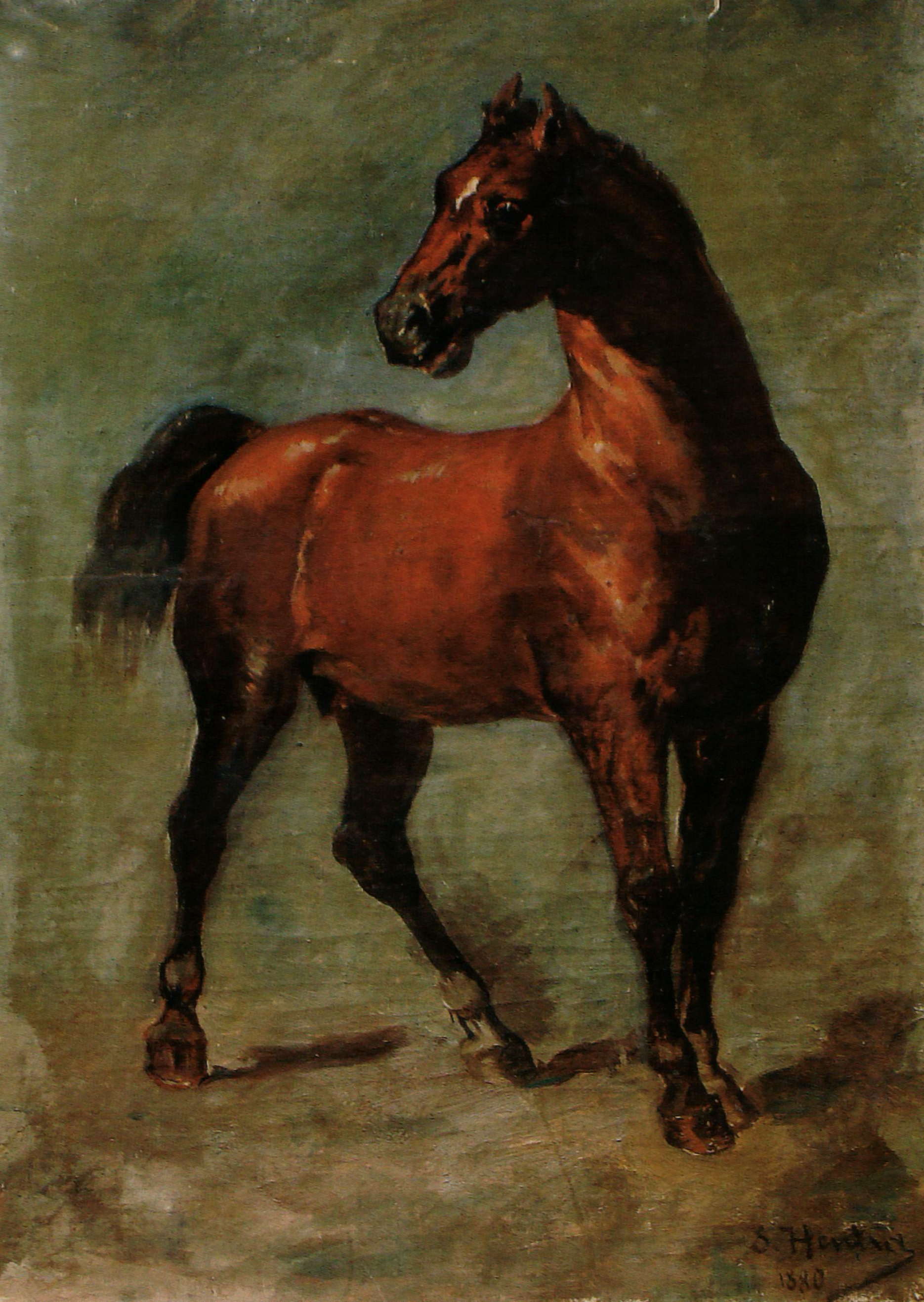 Cal, ulei/pânză lipită pe carton, 36x25.3cm, semnat dreapta jos cu brun deschis S. Henția, datat dreapta jos cu brun deschis 1880, inv. 524, Muzeul Municipiului București - Secția de Artă